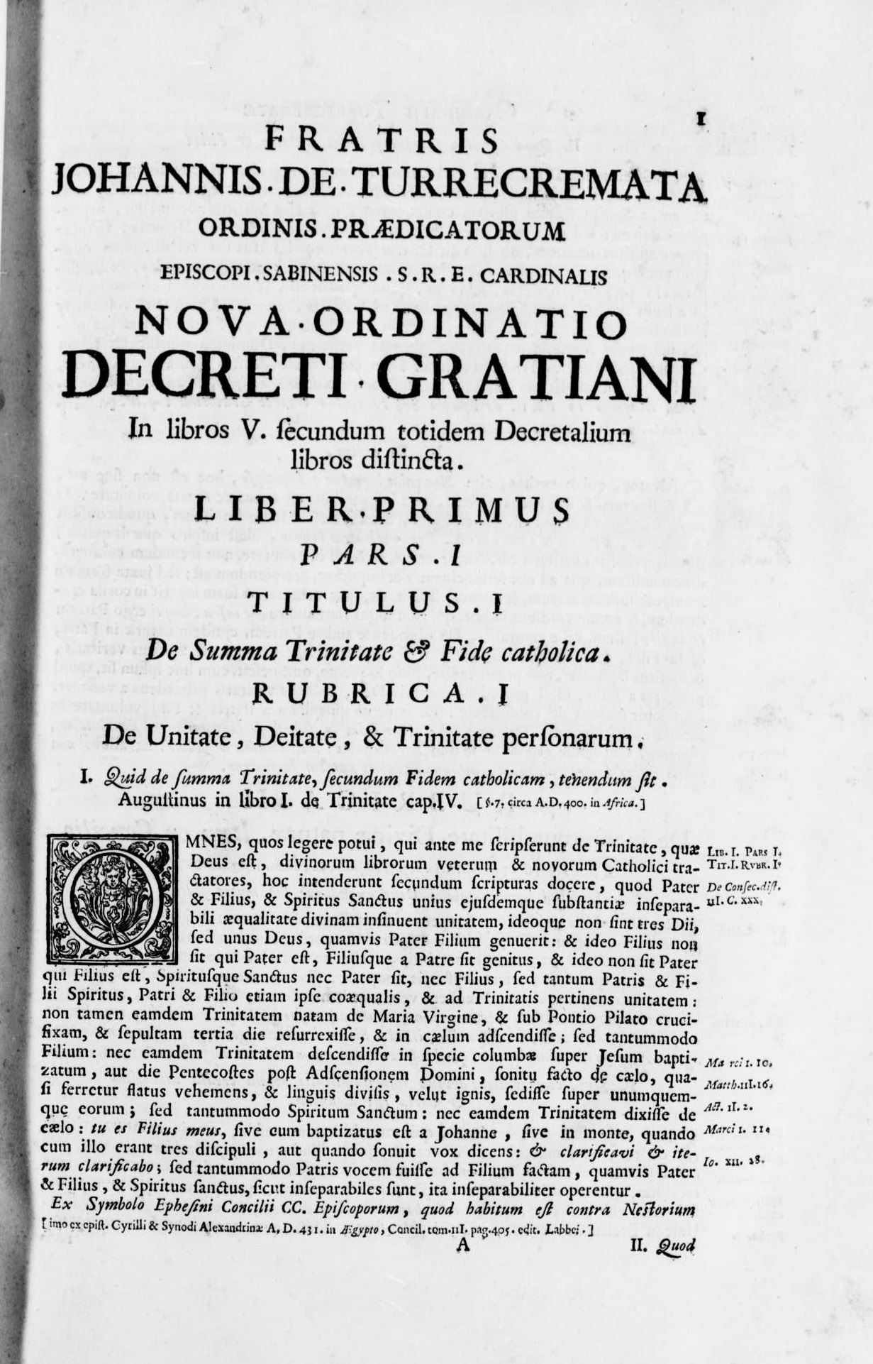 pagina 1